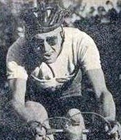 Jacques Dupont, vainqueur de Paris-Tours 1951.